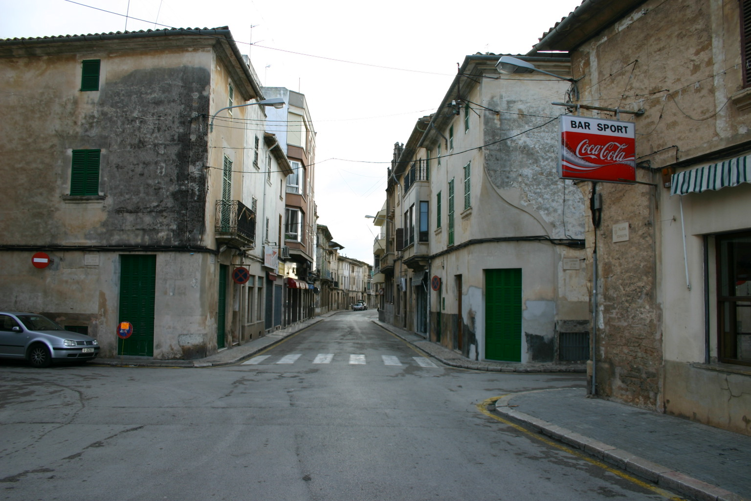 Autor: António M.L. Cabral; Camera: Canon EOS 300D com lentes Canon EFS 18-55mm; Data: 12-11-2005 Local: Llucmajor; Comentarios do Autor: Esta vila é o lugar mais aborrecido que se pode encontrar na ilha de Maiorca. Às 20h já não se vê vivalma, e o comércio já está fechado há muito! Esta cidade é um cadáver!